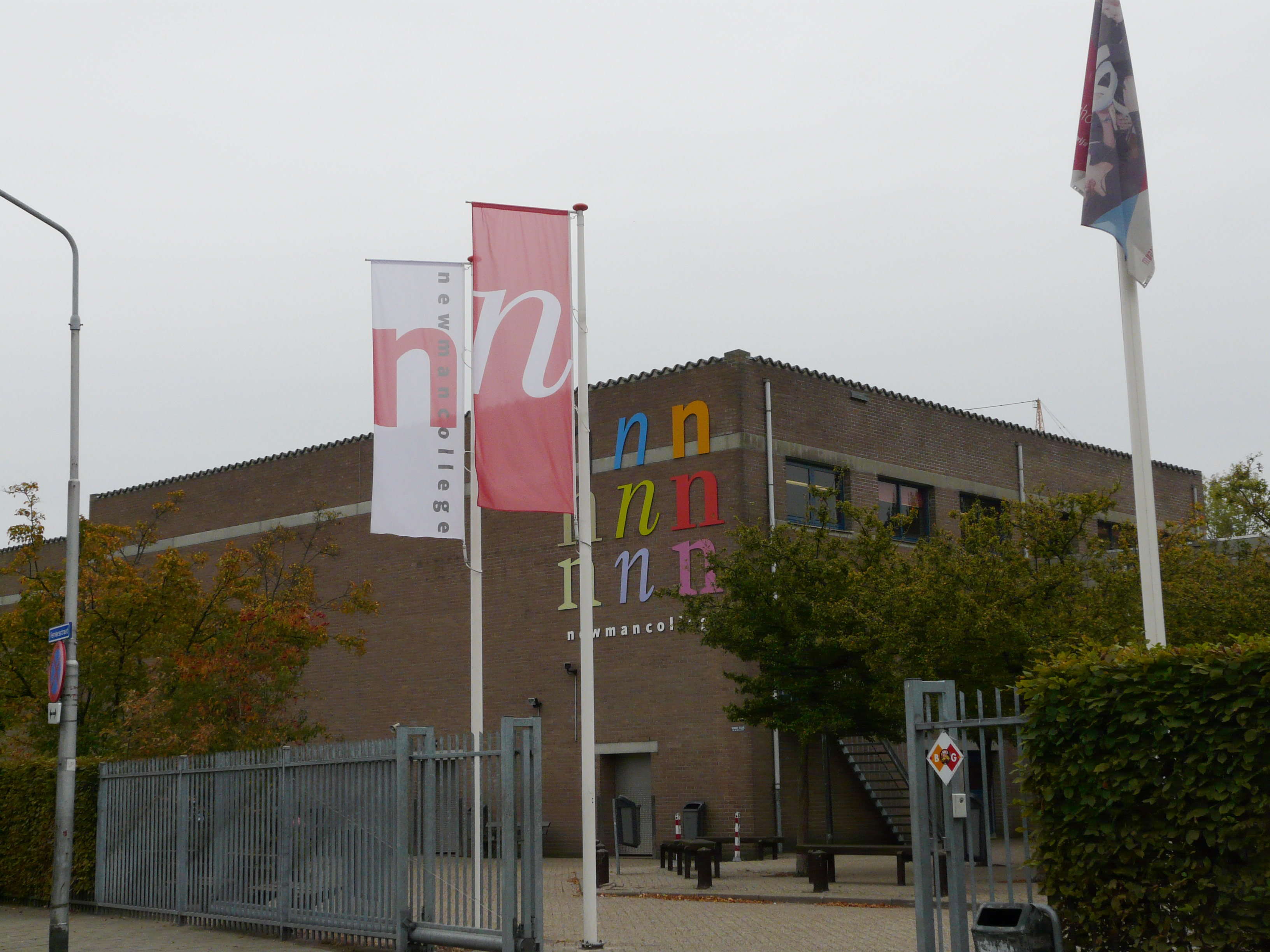 Zicht op een deel van de scholengemeenschap voor middelbaar onderwijs het Newmancollege gevestigd in de Verviersstraat 4 in Breda. Gelegen in de wijk Biesdonk in het noorden van Breda